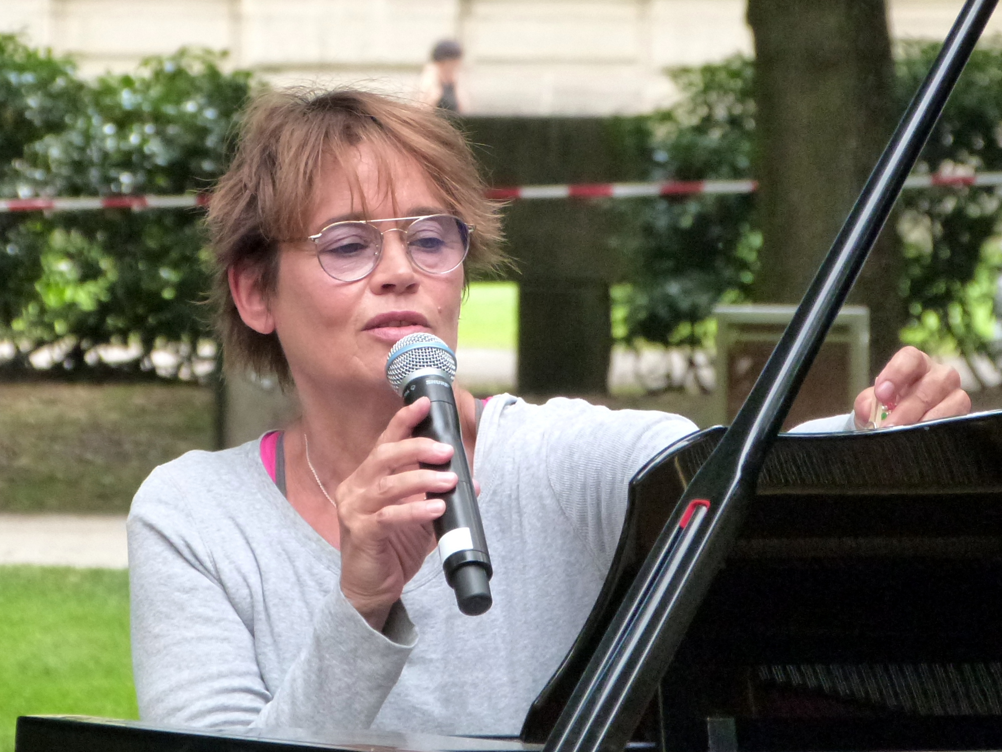 Die Musikerin Ulrike Haage spielt auf dem Erlanger Poetenfest 2016.